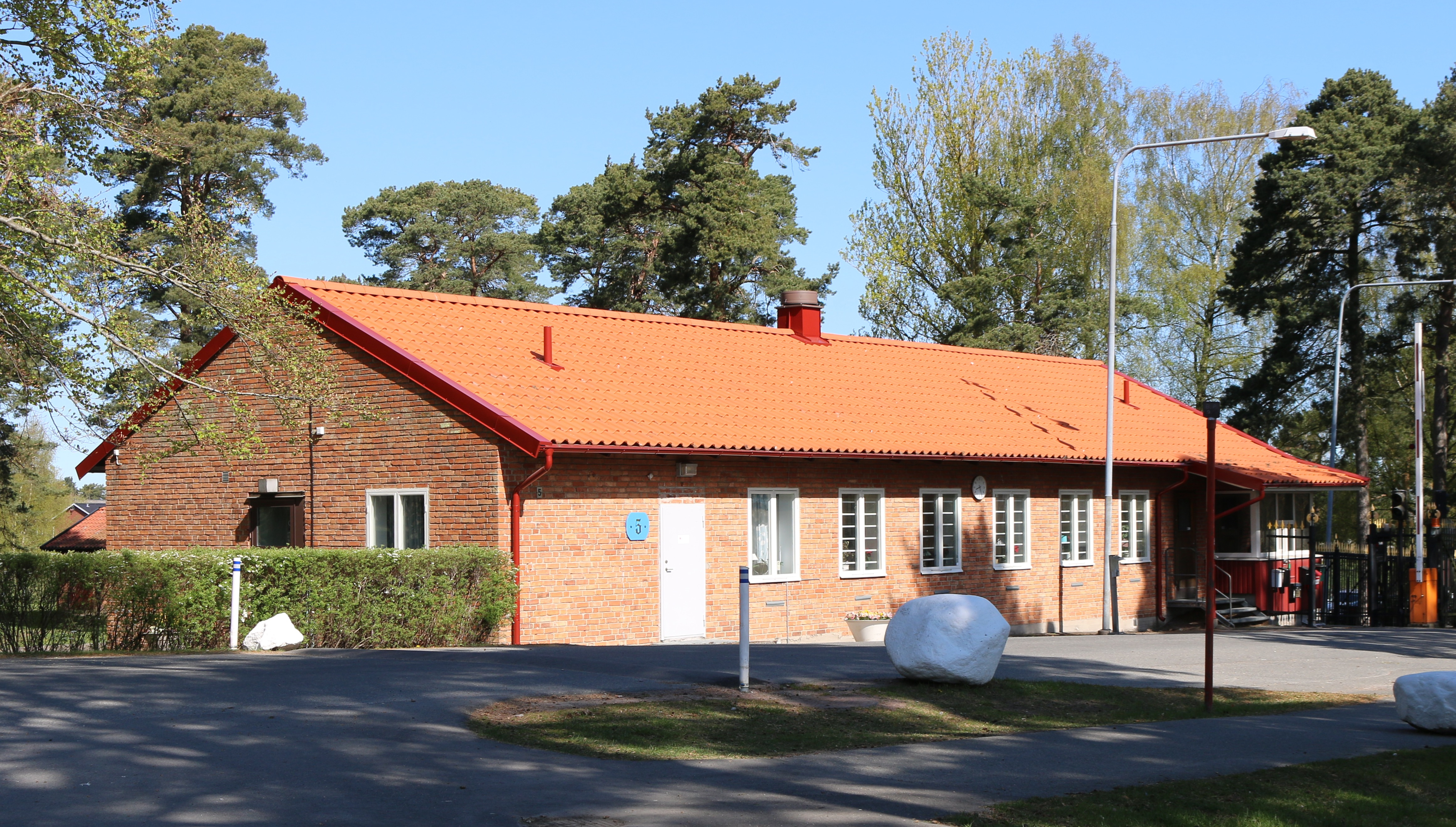 A3 fd Vakten